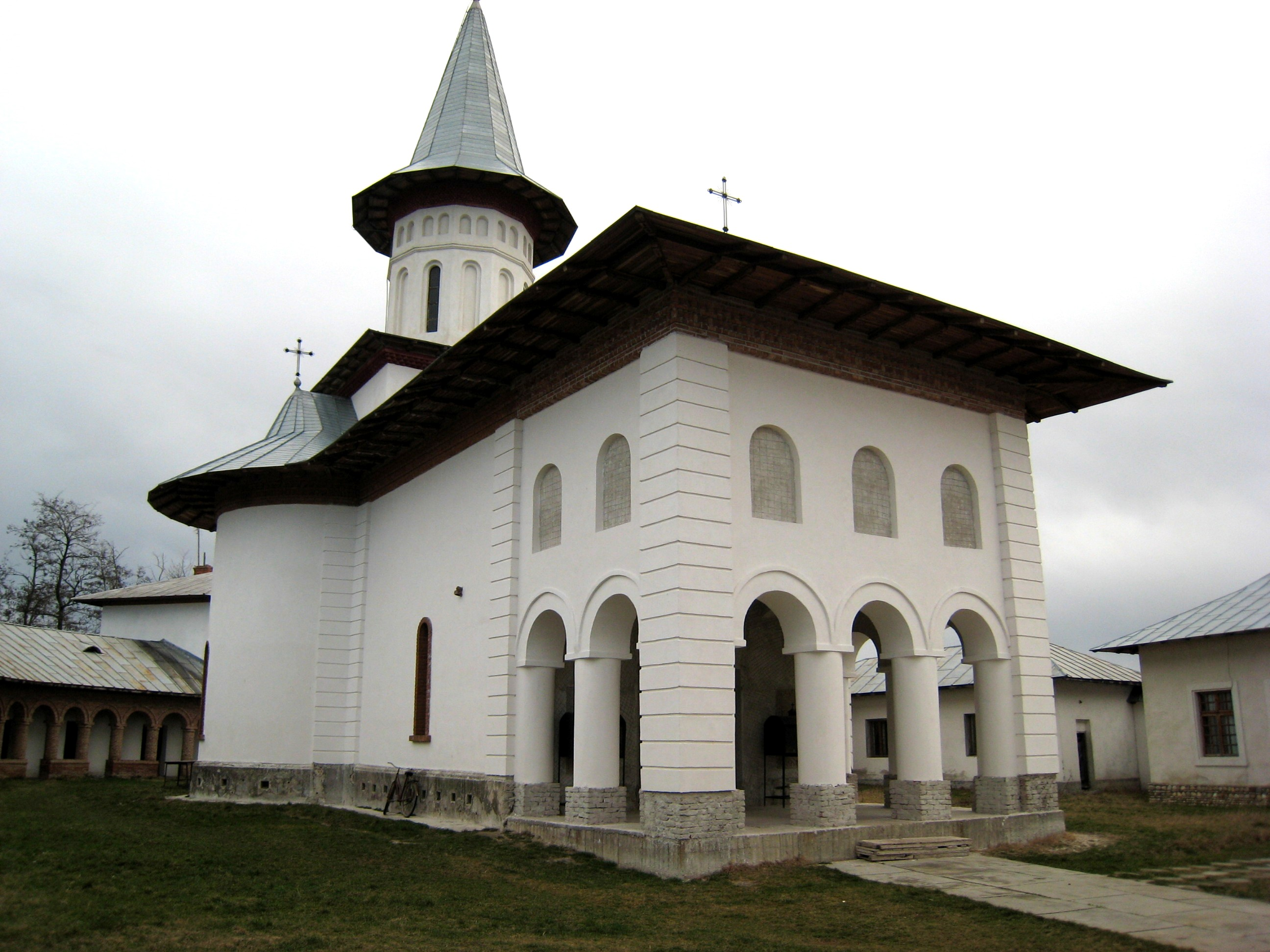 Biserica mănăstirii Glavacioc 9 decembrie 2006 01